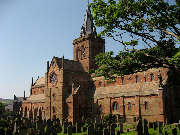 Kirkwall, Orkney